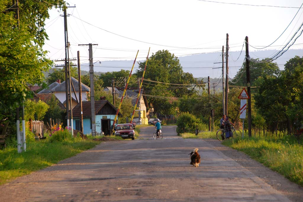 Bocicoiu Mare, Maramureş, Rumänien – Durchgangsstrasse, Blick auf den Bahnübergang Richtung Ortsausgang Sighet